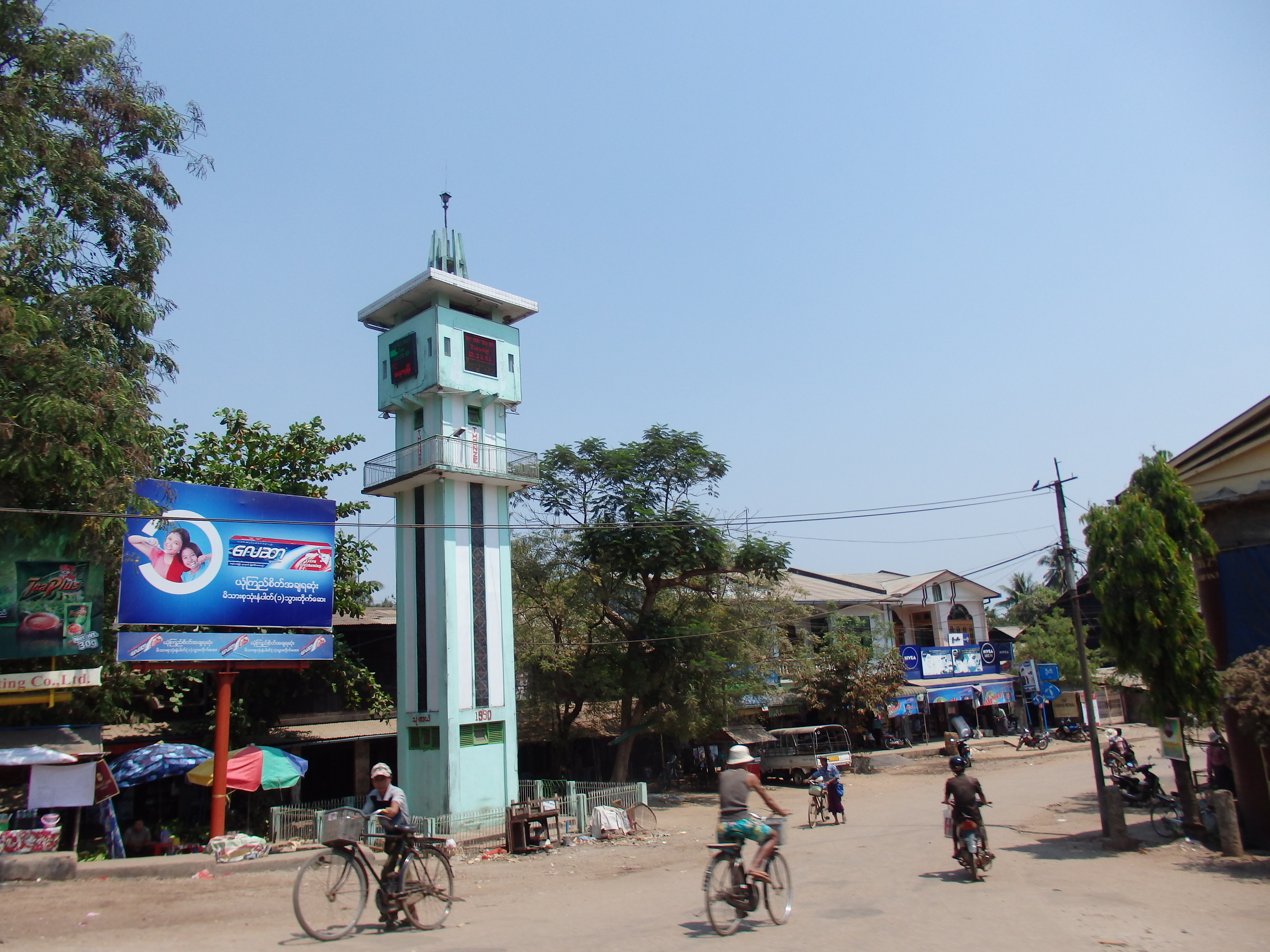 Thonse, Myanmar (Burma)